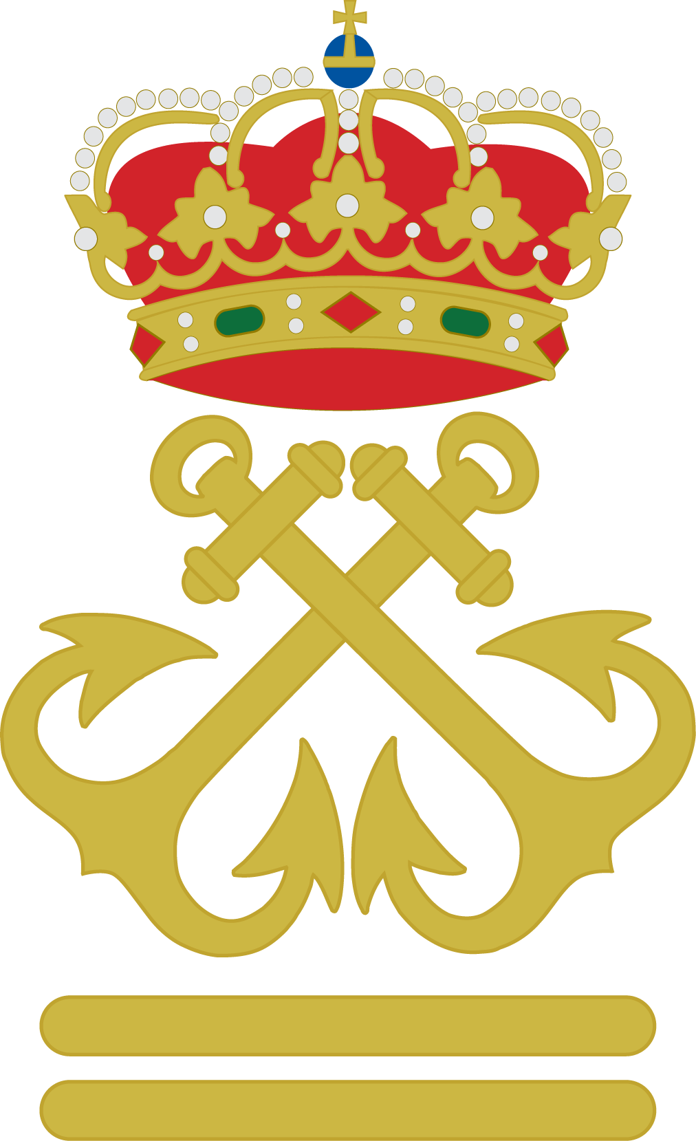 Distintivo de Patrón de Yate Note: Agradeceria su información sobre los datos de la bandera española izada en la Plaza Colon de Madrid: 1.- Altura del Asta o mástil 2.- Peso del mástil 3.- Dimensiones de la bandera (largo por ancho) 4.- Peso de la bandera en kgs. 5.- Material con el que está confeccionada 6.- Fecha de su inauguracion (primera izada)